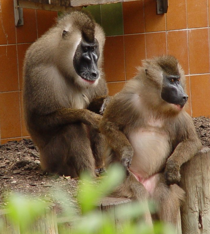 male and female drill_Congo and Cabinda Barcelona Zoo